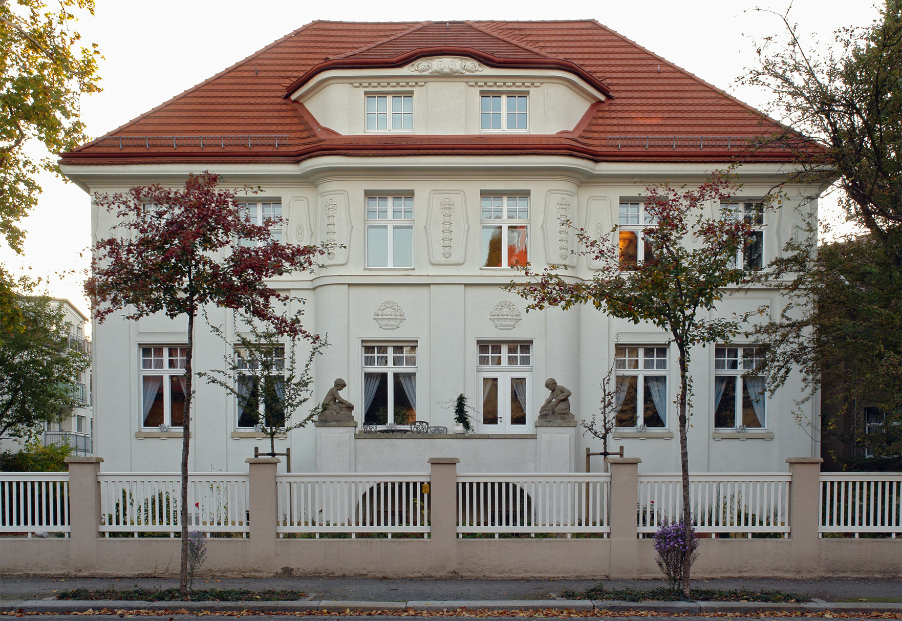 Villa Würzburger in Dresden-Striesen Stresemannplatz 7 / Ecke Heubnerstraße